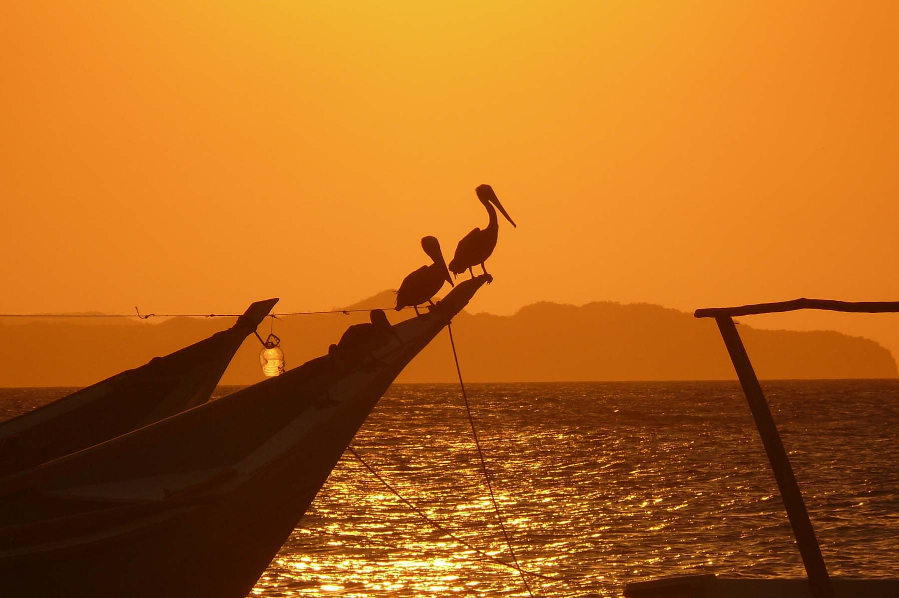 Desde San Juan de Las Galdonas - Sucre